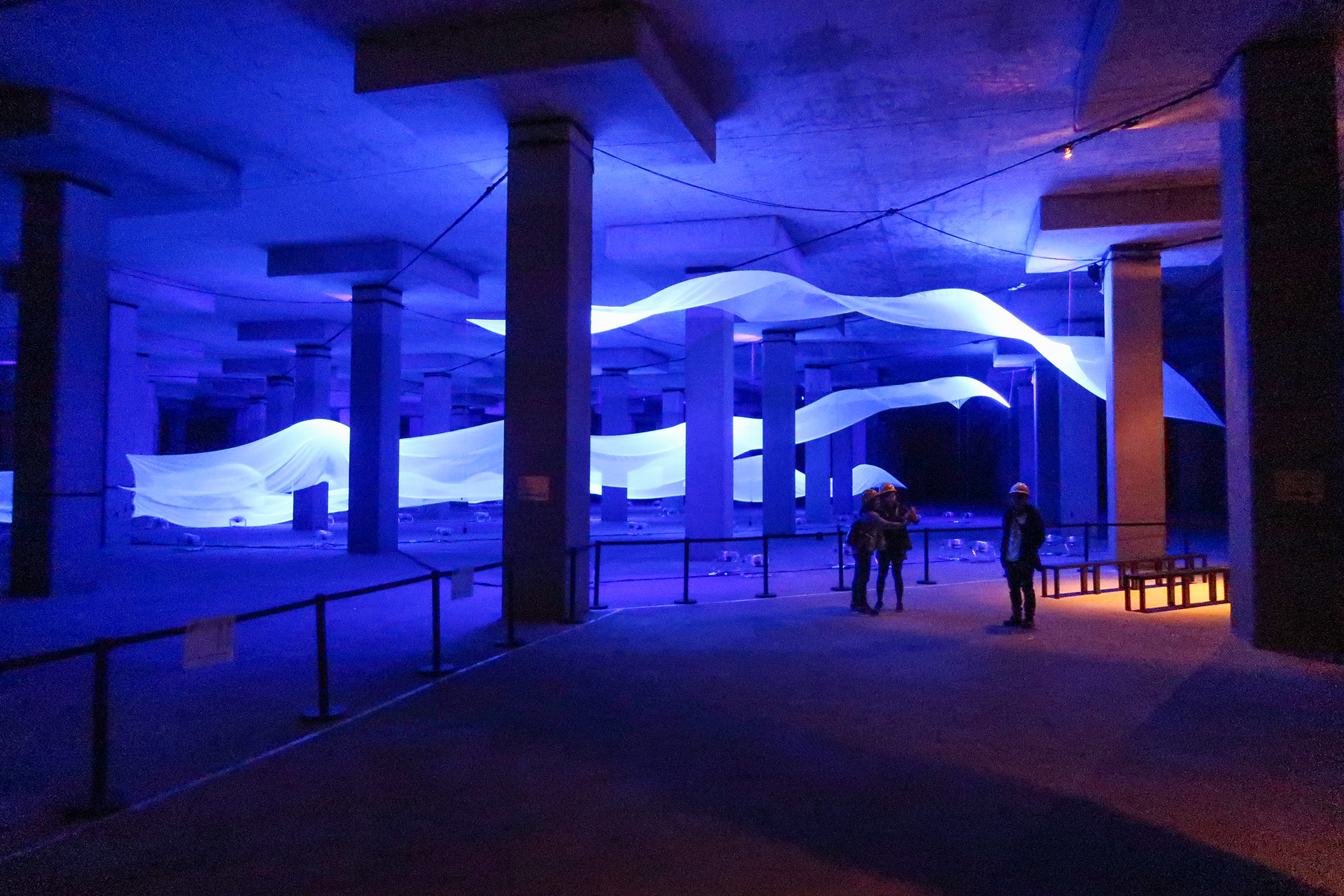 Tai Hang Tung Flood storage